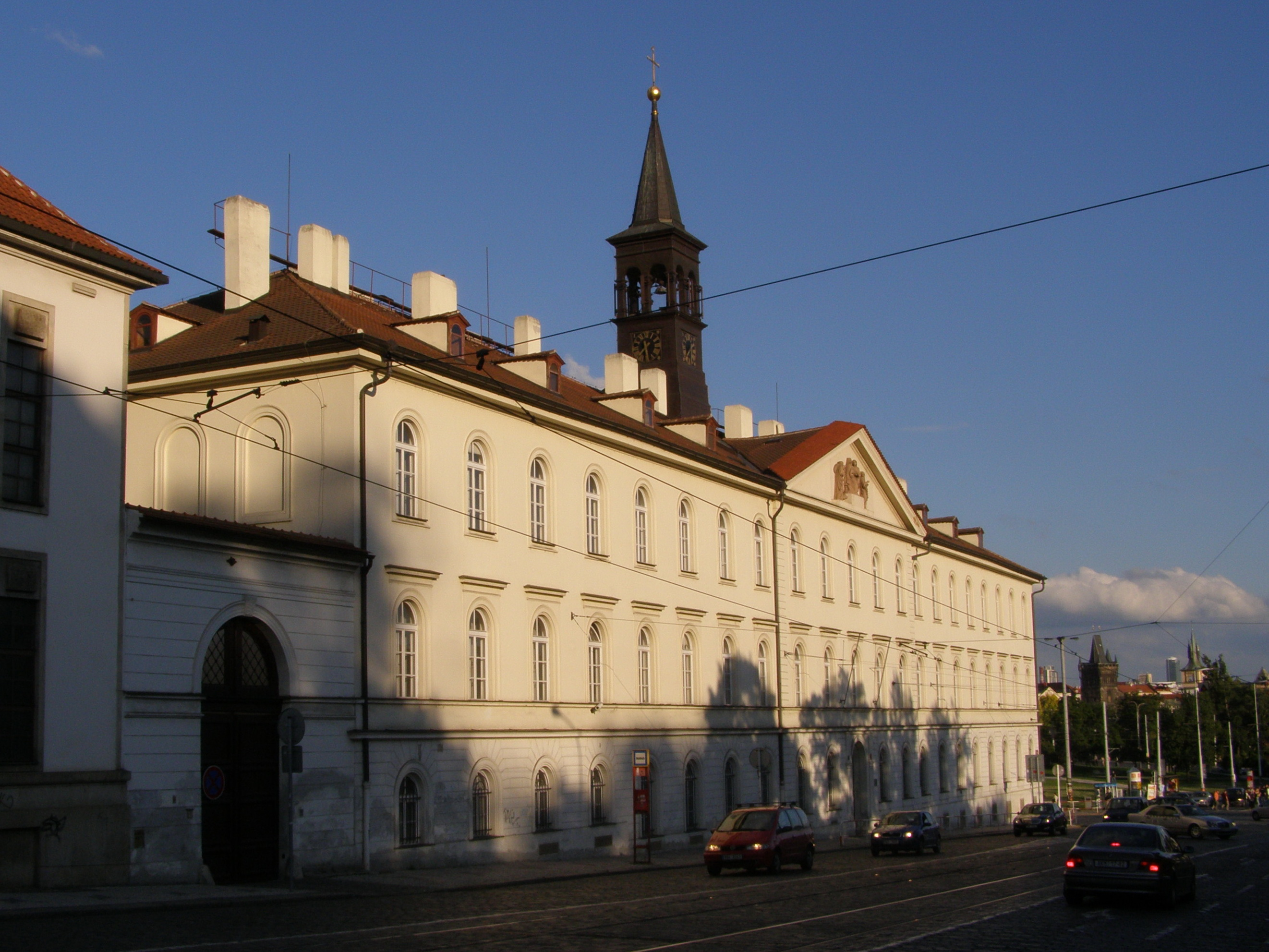 Praha, Malá Strana, Klárov, bývalý Klarův ústav slepců